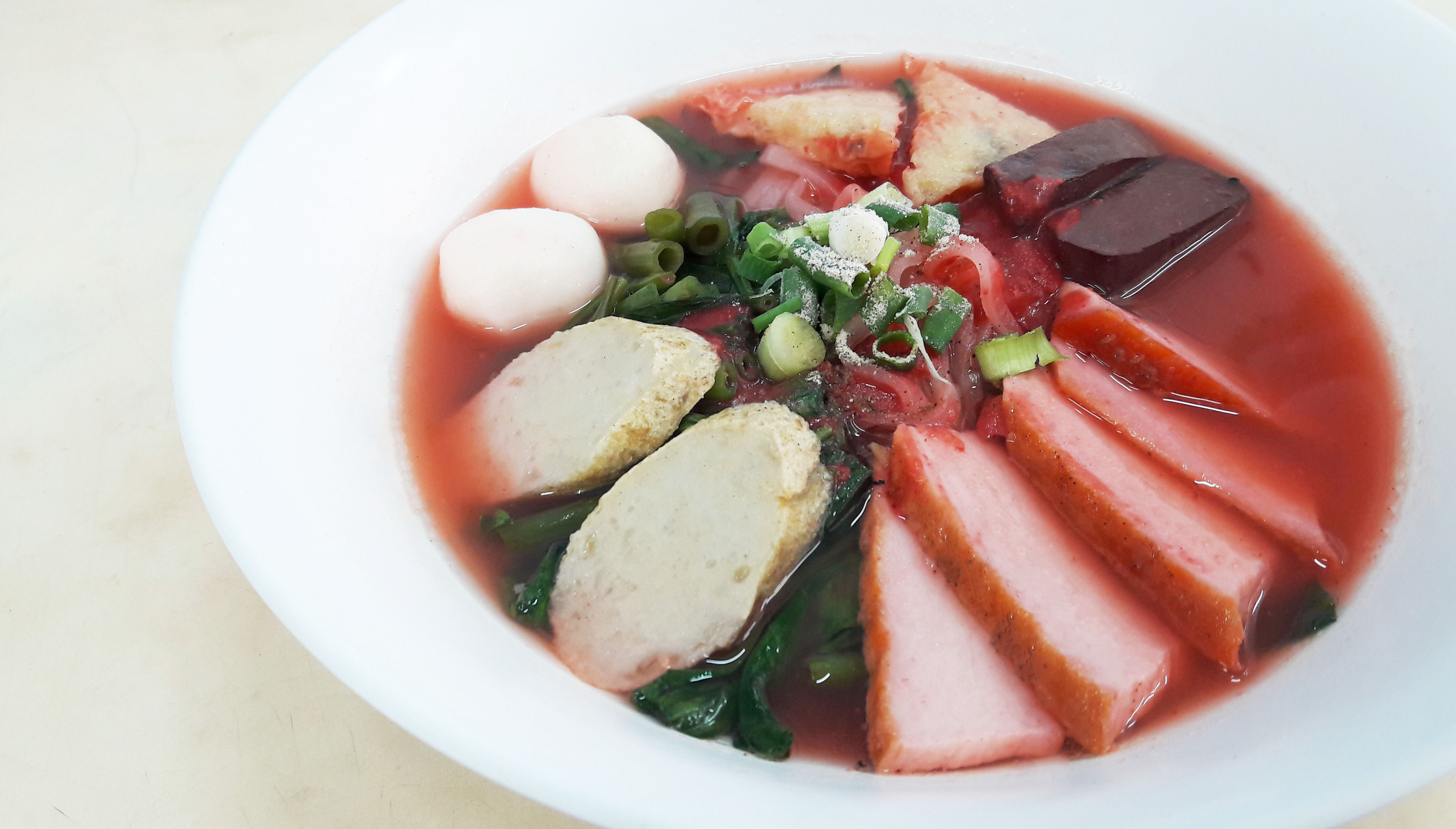 Thai food Tofu red soup with noodle and RedPork BBQ